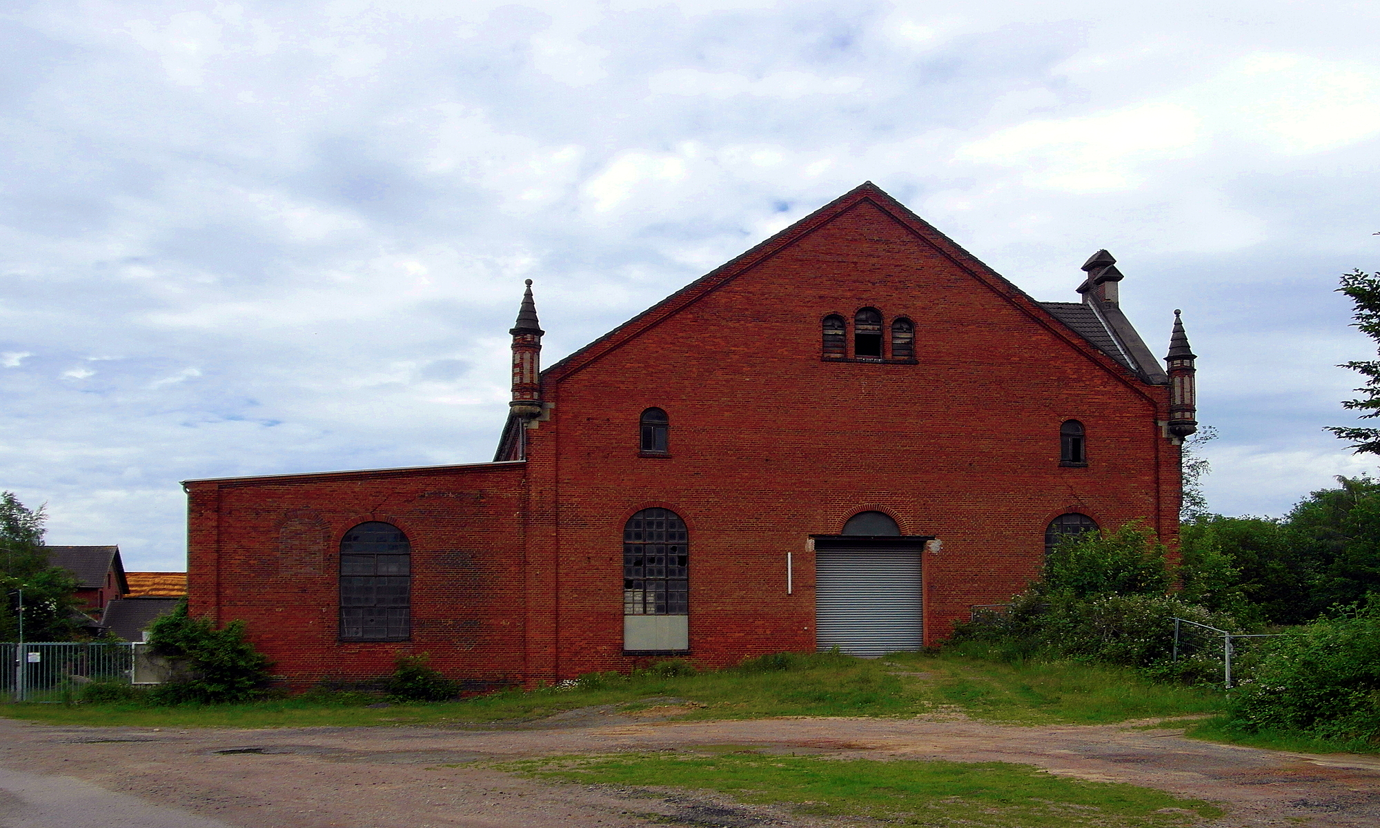 restauriertes Kraftwerksgebäude am Georgschacht